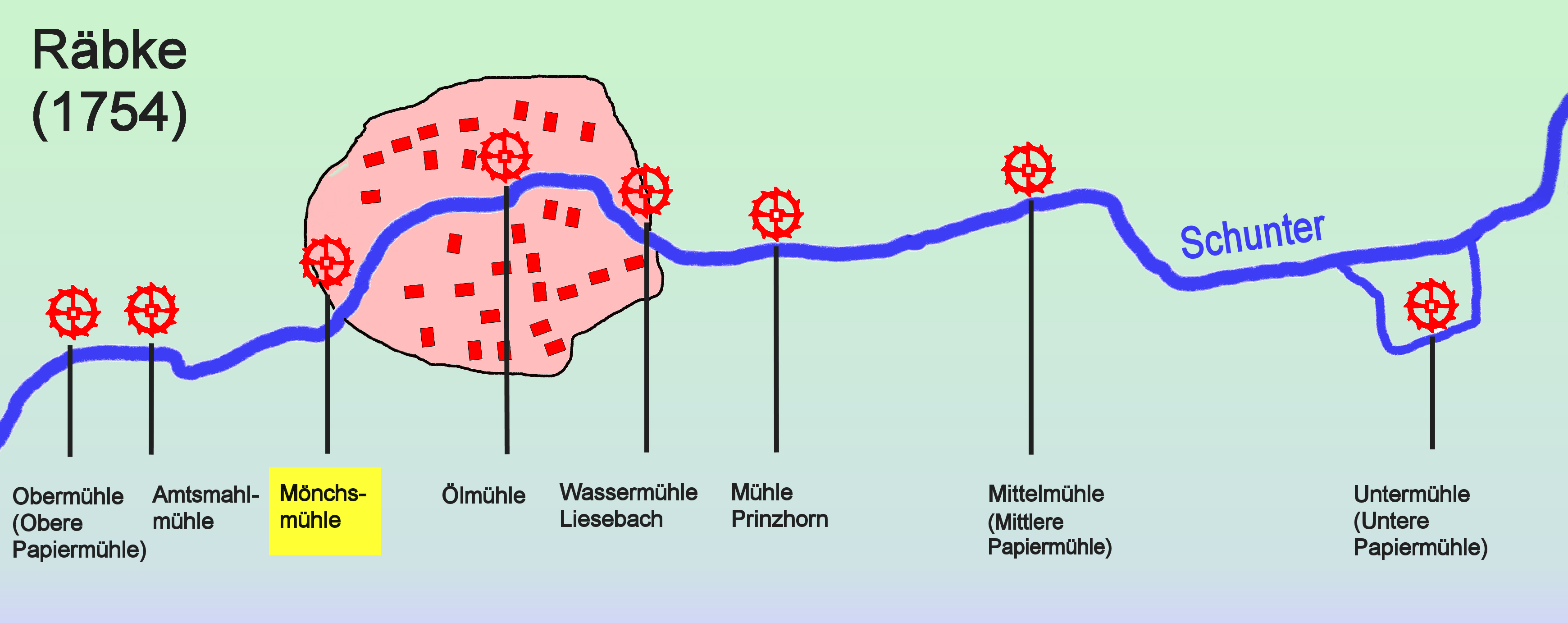 Mönchsmühle, Zeichnung nach der Braunschweigischen General-Landesvermessung von 1754